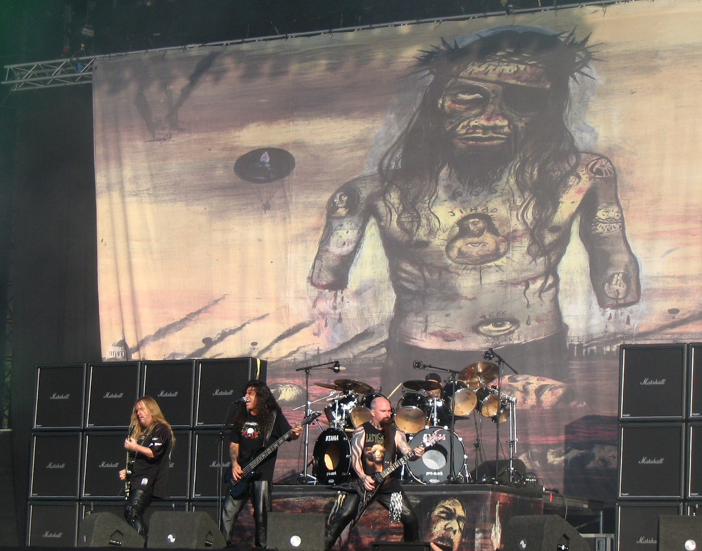 Slayer band